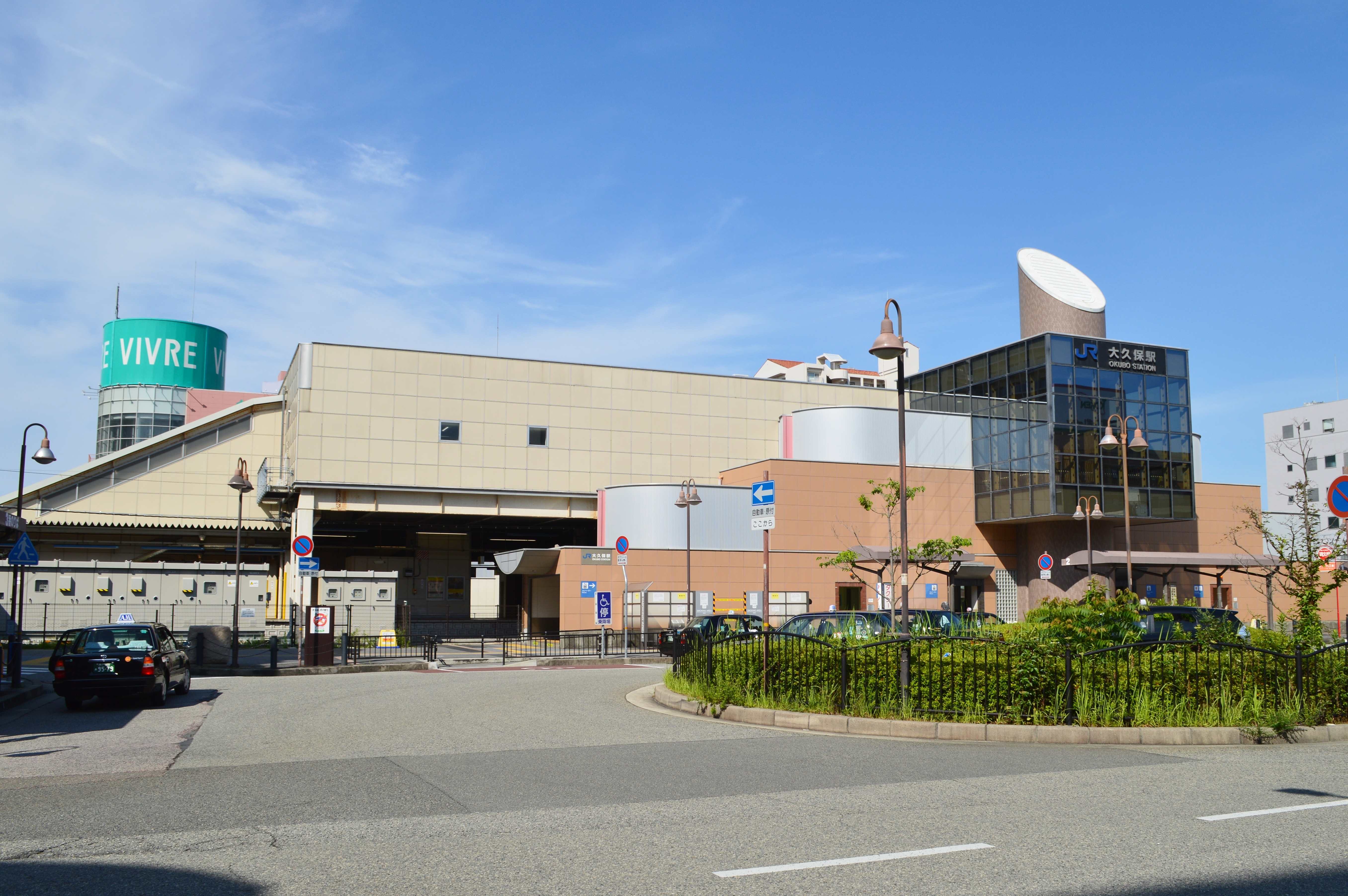 大久保駅 (兵庫県) 駅舎 Nikon D3200